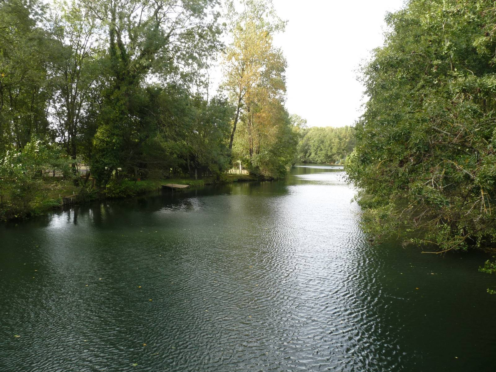 la Charente à Chenon et Chenommet, Charente, France